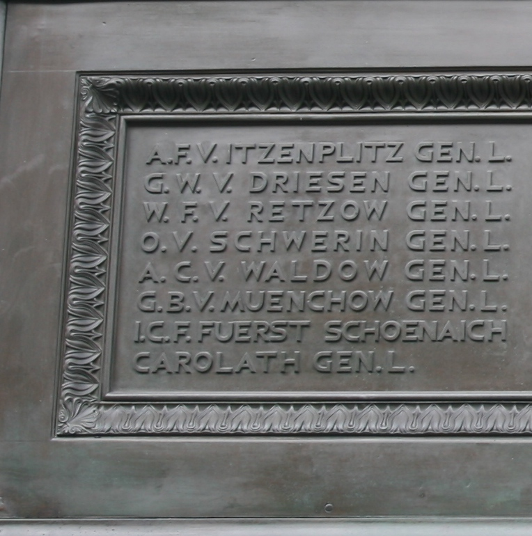 Reiterstandbild - Friedrich der Große - Südansicht ( Details ) unten - Namenstafel - Links A.F. V. ITZENPLITZ GEN.L. -------------- August Friedrich von Itzenplitz G.W. V. Driesen GEN. L. --------- Georg Wilhelm von Driesen W.F. V. Retzow GEN.L. ------ Wolf Friedrich von Retzow O. V. SCHWERIN GEN.L ----------------- Otto Magnus von Schwerin A.C. V. WALDOW GEN.L. ------ Arnold Christoph von Waldow G.B. V. MUENCHOW GEN.L. ------------ Gustav Bogislav von Münchow I.C.F. FUERST SCHOENAICH CAROLATH GEN.L. ---------- Johann Carl Friedrich zu Carolath-Beuthen Quelle der Links : wiki Berlin - Unter den Linden ( Mittelpromenade ) Baudenkmal ( LDA ) Landesdenkmalamt - Berlin Dok Nr. 09060118 LDA Info wiki Reiterstandbild Friedrichs des Großen